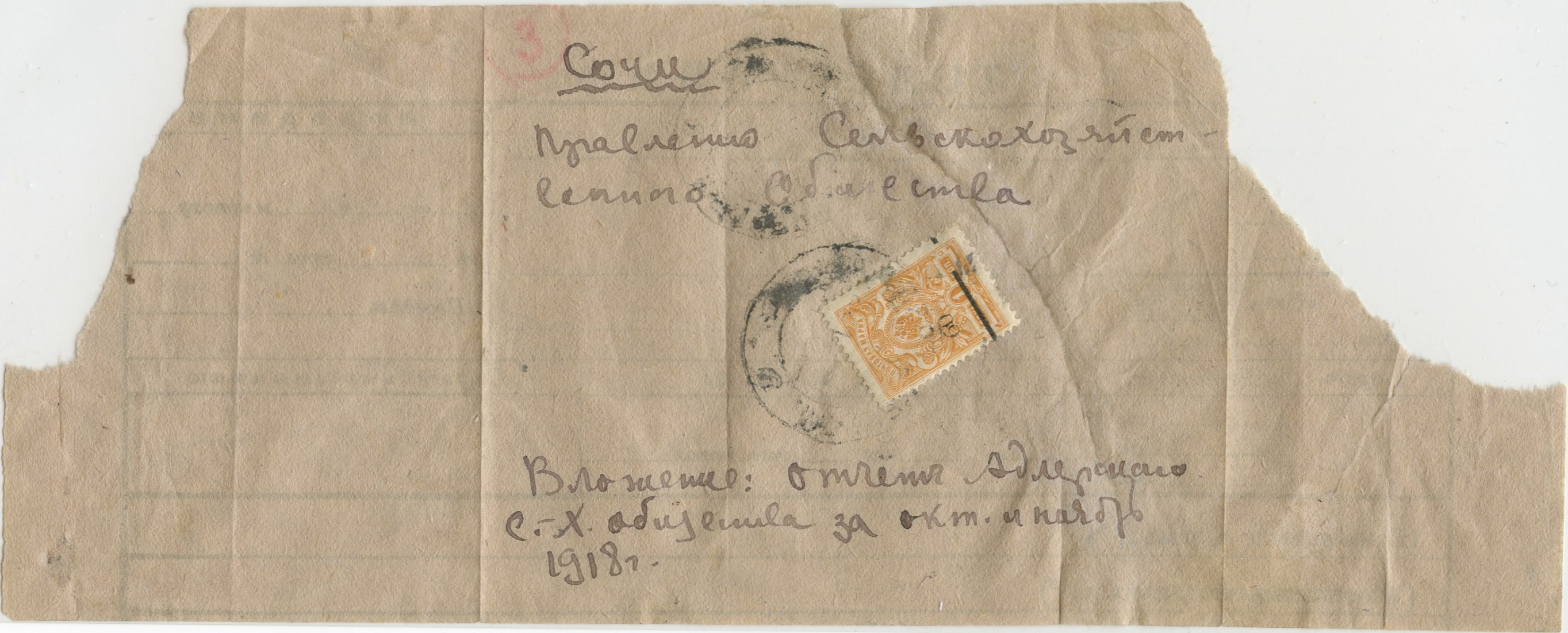 Обёртка бандероли с отчётом Адлерского сельскохозяйственного общества за октябрь-ноябрь 1918 года, посланным в Сочи, с маркой Сочи